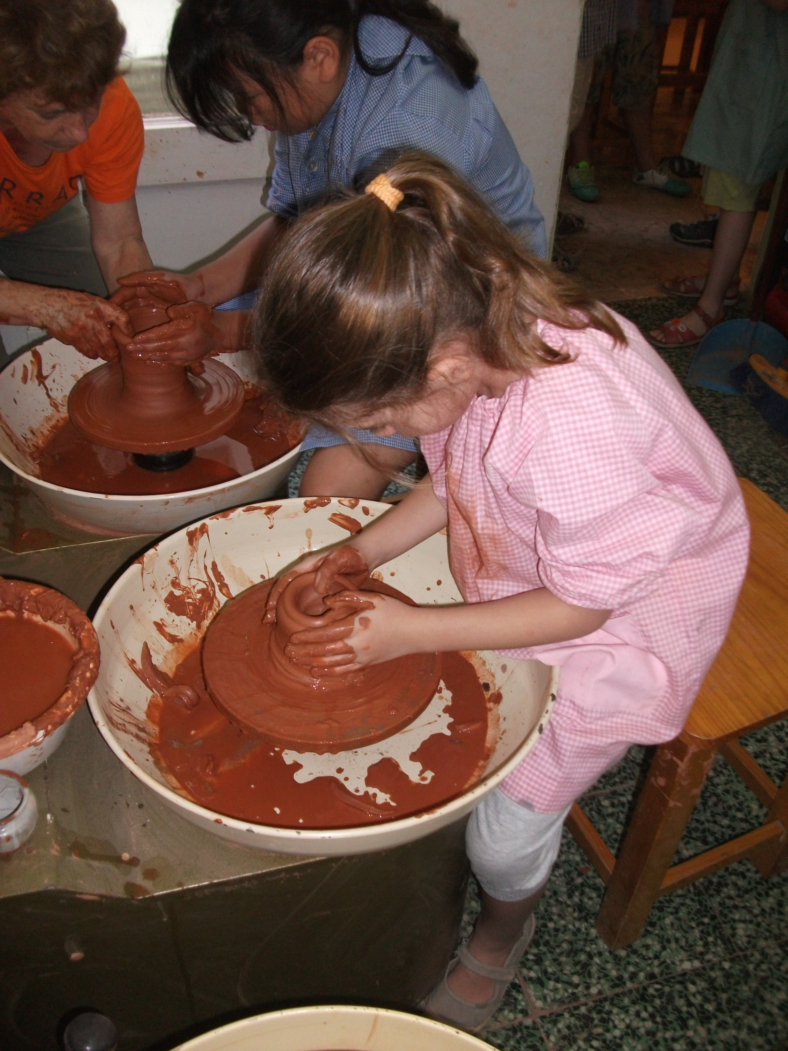 Classe de torn per nens i netes de 6 a 9 anys a l'escola el Xerrac